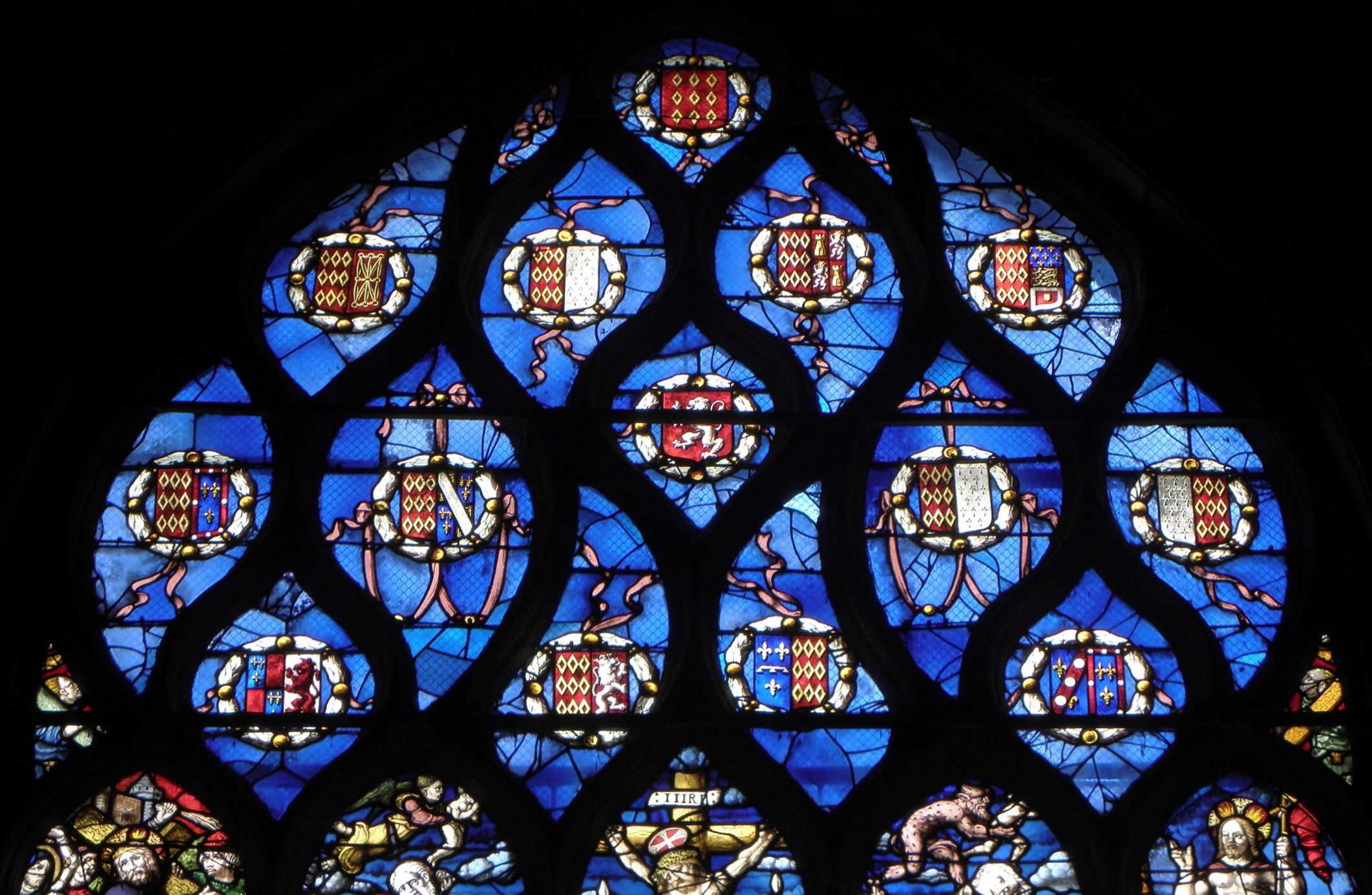 Maîtresse-vitre de l'église Saint-Yves de La Roche-Maurice (29).